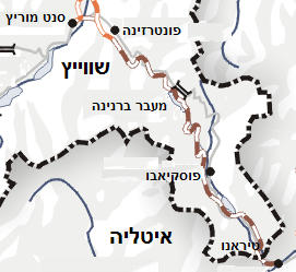 Darstellung zeigt Lage und Verlauf der Albulabahns. Zeichnung erstellt 2004 von Benutzer:Sansculotte. Bild ist unter der GNU FDL zur weiteren Verwendung freigegeben. Quellenangabe und Beleg an erbeten.